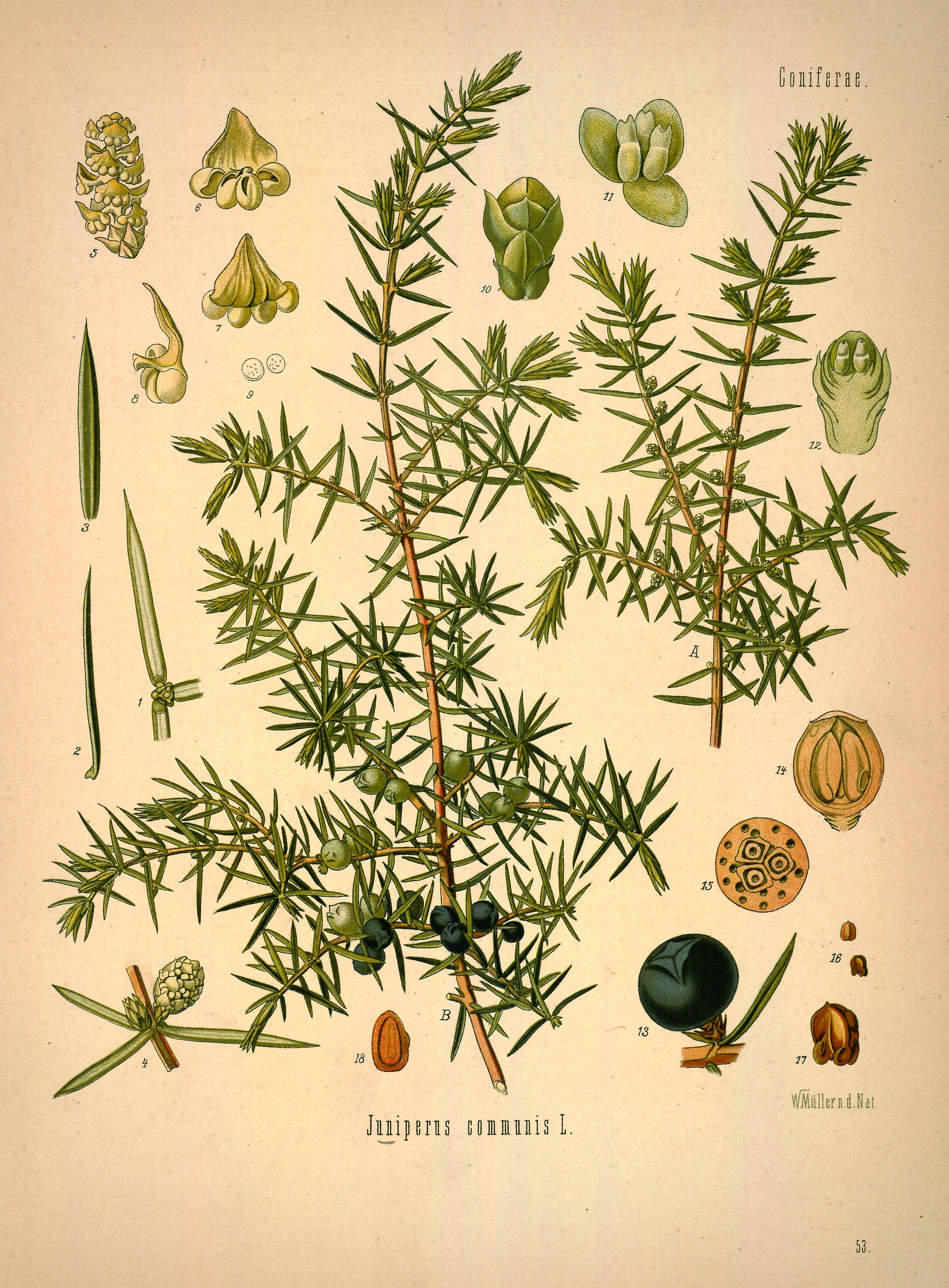 Gemeiner Wacholder. A männlicher Blüthenzweig, natürl. Grösse; B Zweig der weiblichen Pflanze, desgl.; 1 Querschnitt eines jüngeren Zweiges, mit Nadeln, vergrössert; 2 u. 3 Nadeln von verschiedenen Seiten, desgl.; 4 Zweigstück mit männlichem Blüthenkätzchen, desgl.; 5 männliches Blüthenkätzchen, geöffnet, desgl.; 6, 7, 8 Staubblätter von verschiedenen Seiten, desgl.; 9 Pollen unter Wasser, desgl.; 10 weibliches Blüthenkätzchen, desgl.; 11 Eichen mit den Fruchtblättern, desgl.; 12 weibliches Kätzchen im Längsschnitt, desgl.; 13 Beerenzapfen, desgl.; 14, 15 derselbe im Längs- und Querschnitt, desgl.; 16, 17 Same, natürl. Grösse und vergrössert; 18 derselbe im Längsschnitt, desgl.Köhler's Medizinal-Pflanzen in naturgetreuen Abbildungen mit kurz erläuterndem Texte : Atlas zur Pharmacopoea germanica, austriaca, belgica, danica, helvetica, hungarica, rossica, suecica, Neerlandica, British pharmacopoeia, zum Codex medicamentarius, sowie zur Pharmacopoeia of the United States of America /